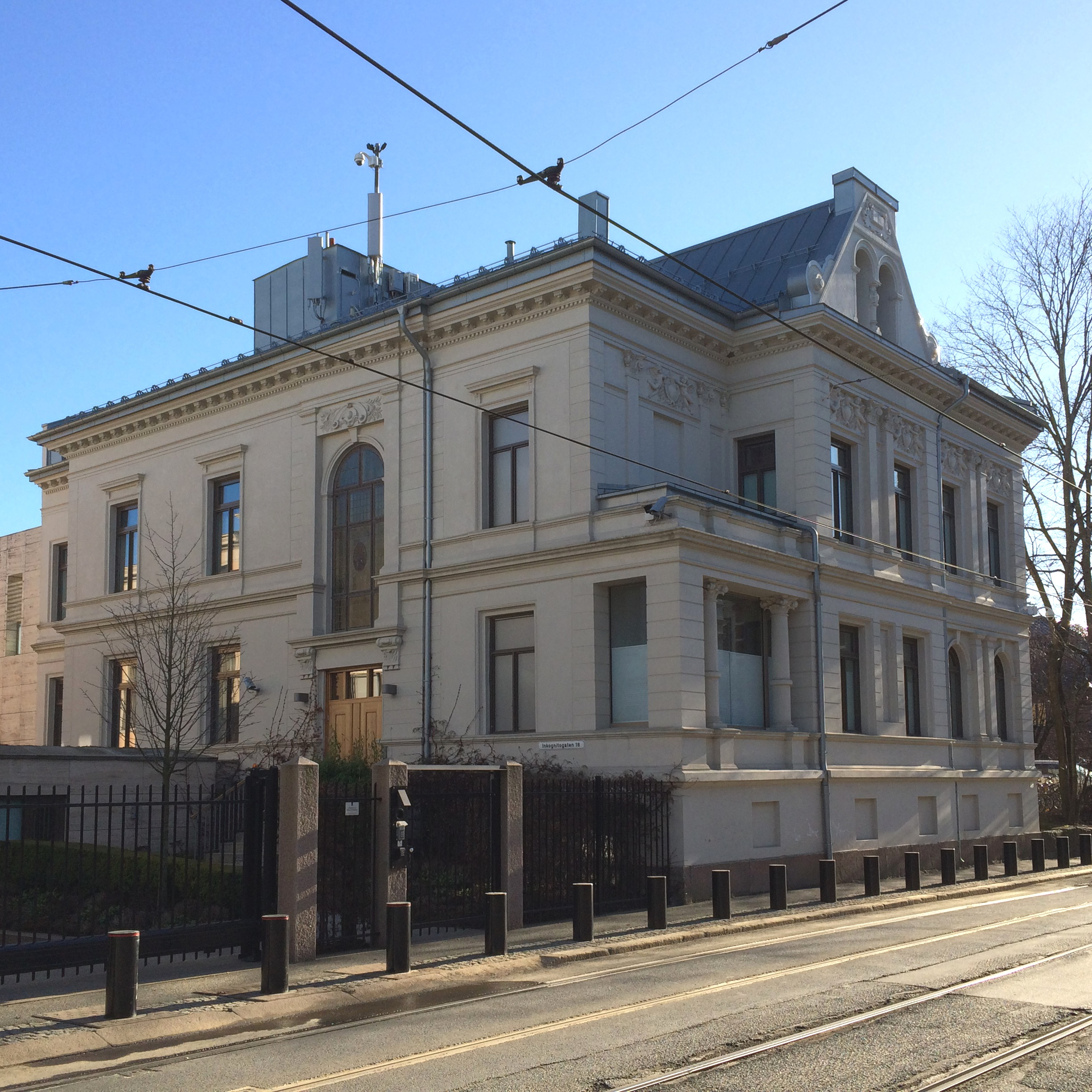 Inkognitogata 18